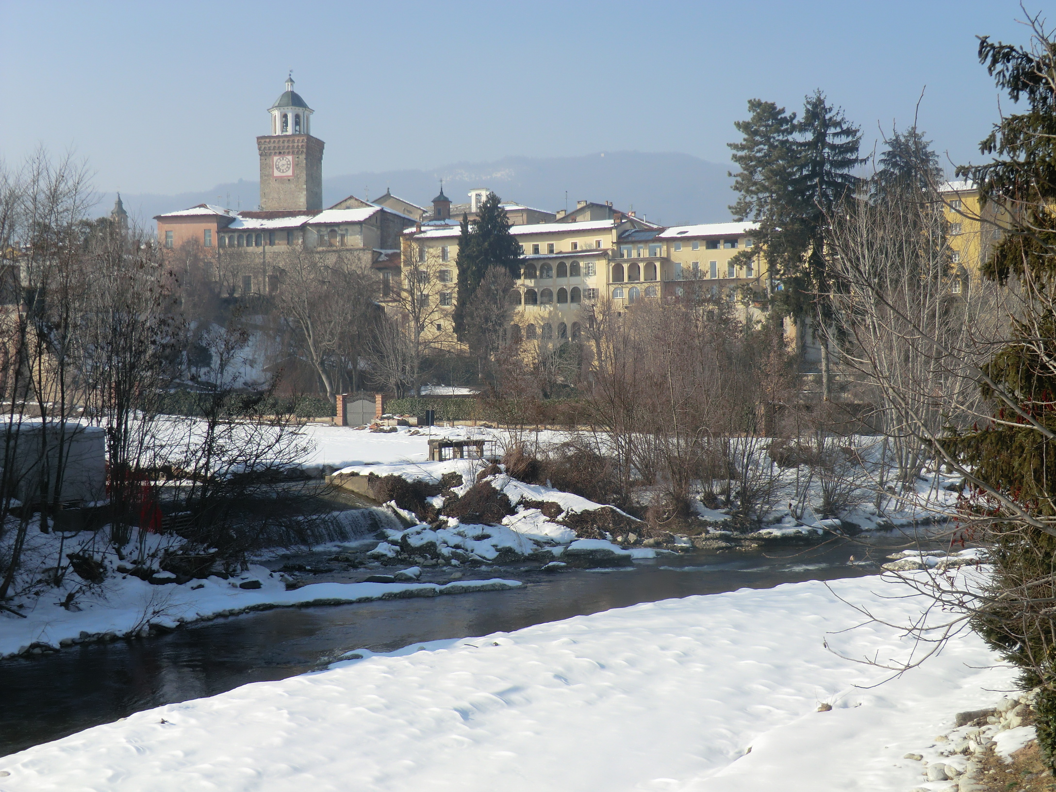 Busca (Cuneo): torrente Maira